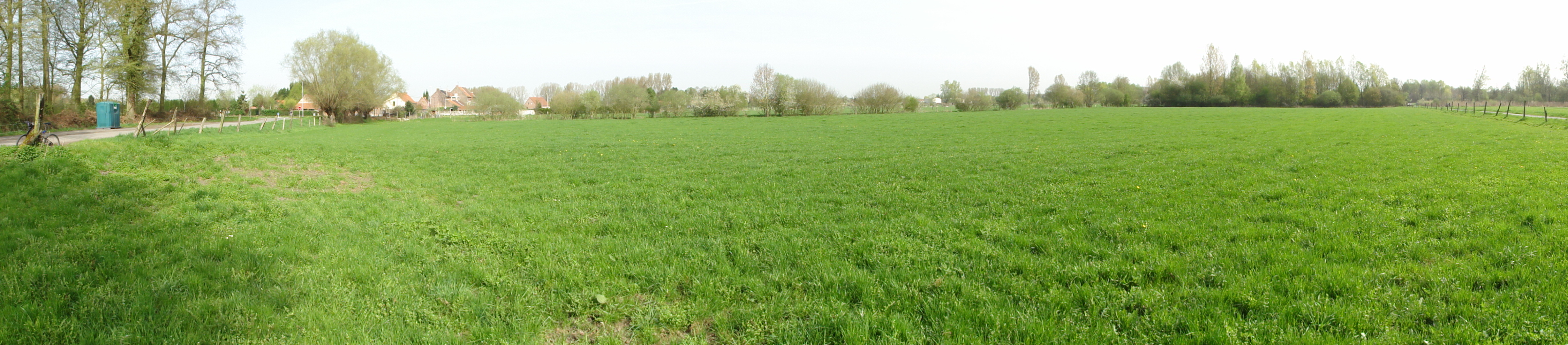 L'Avaleresse des Prés Barrés de la Compagnie d'Hasnon était un puits sans exploitation situé à Hasnon, Nord, Nord-Pas-de-Calais, France.